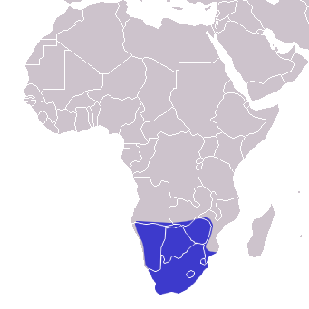 Verbreitungsgebiet Pseudaspis cana - Distribution of Pseudaspis cana